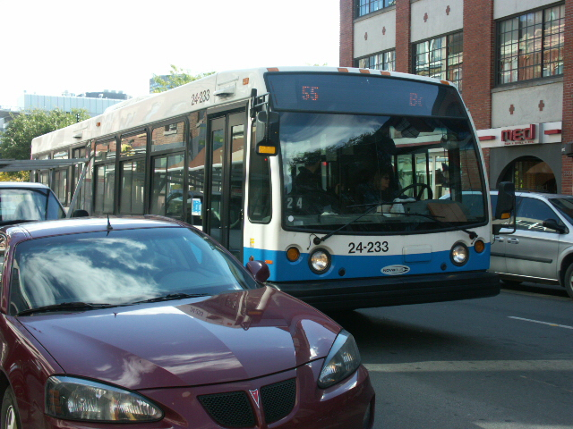 Bus from the STM (Société de Transport de Montréal). Photo by: User:Gene.arboit